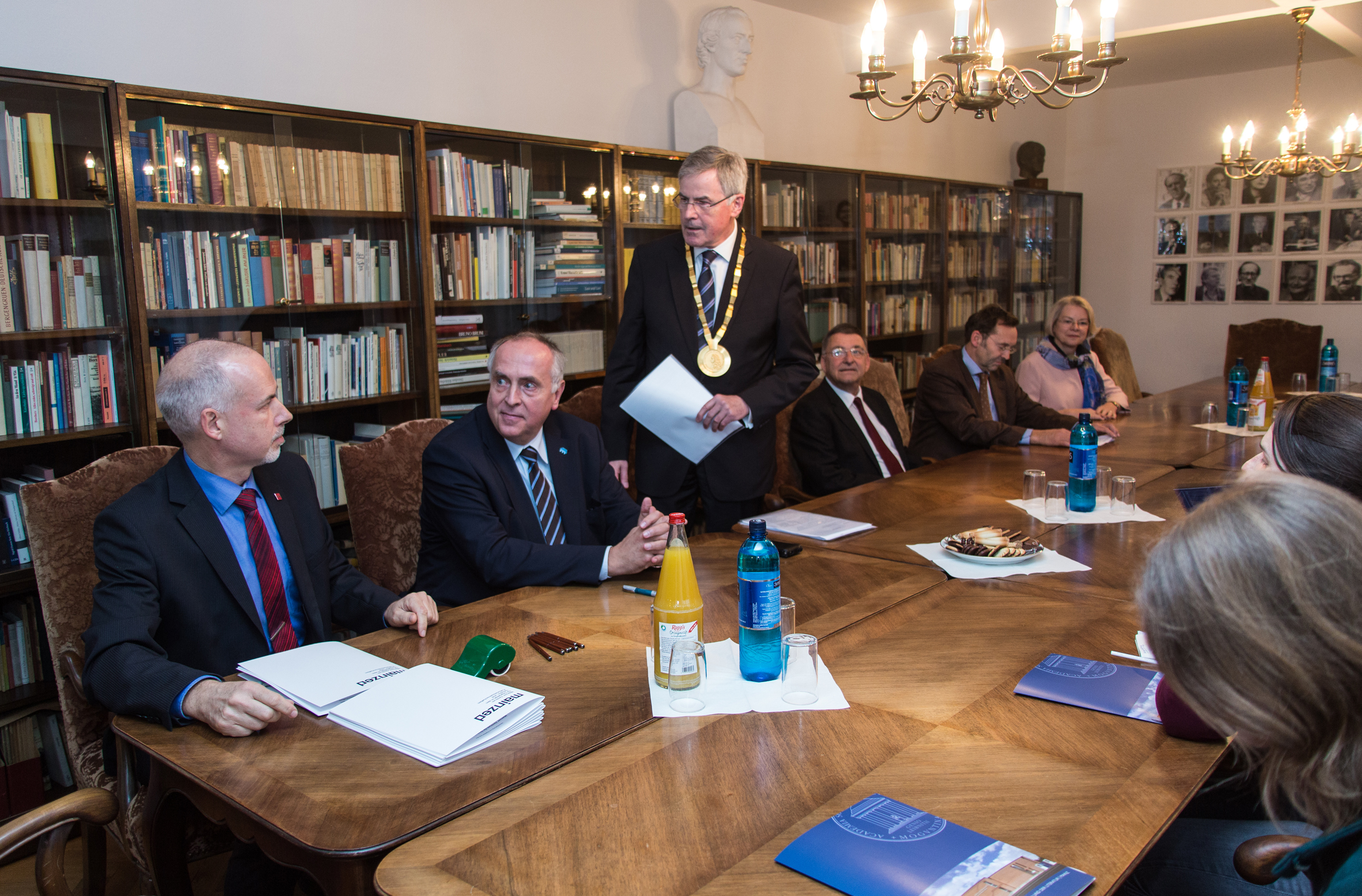 Foto der Unterschriftensession bei der Gründung des mainzed am 6. November 2015. Zu sehen sind von links nach rechts: Prof. Dr. Georg Krausch (JGU), Prof. Dr.-Ing. Gerhard Muth (HS Mainz), Prof. Dr. Gernot Wilhelm (ADW), Prof. Dr. Michael Matheus (IGL), Prof. Dr. Falko Daim (RGZM), Prof. Dr. Irene Dingel (IEG)